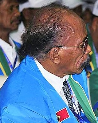 Cornélio da Conceição Gama auf dem ersten Nationalkongress der PLP